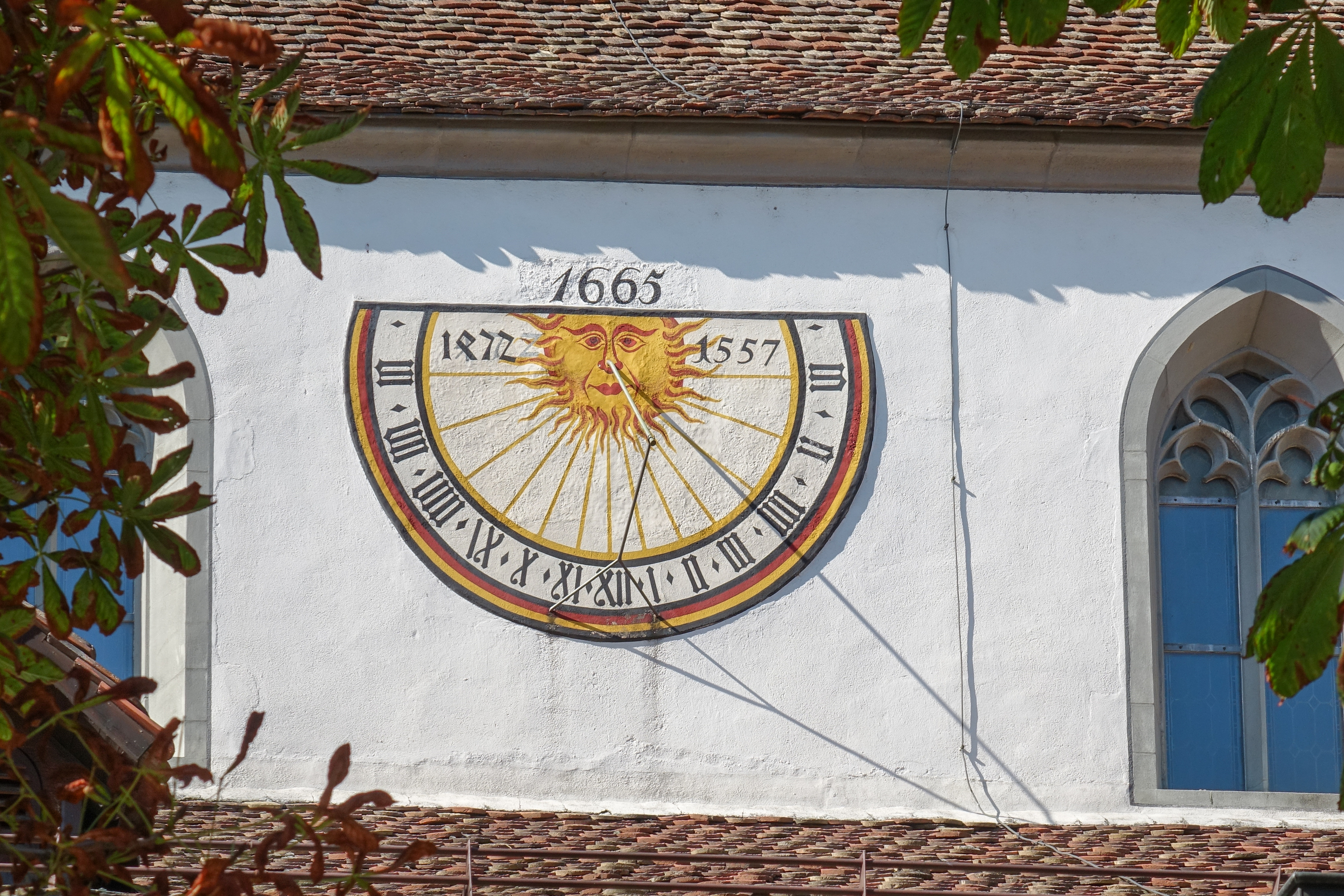 Sonnenuhr. Kirche St. Johann Schaffhausen.